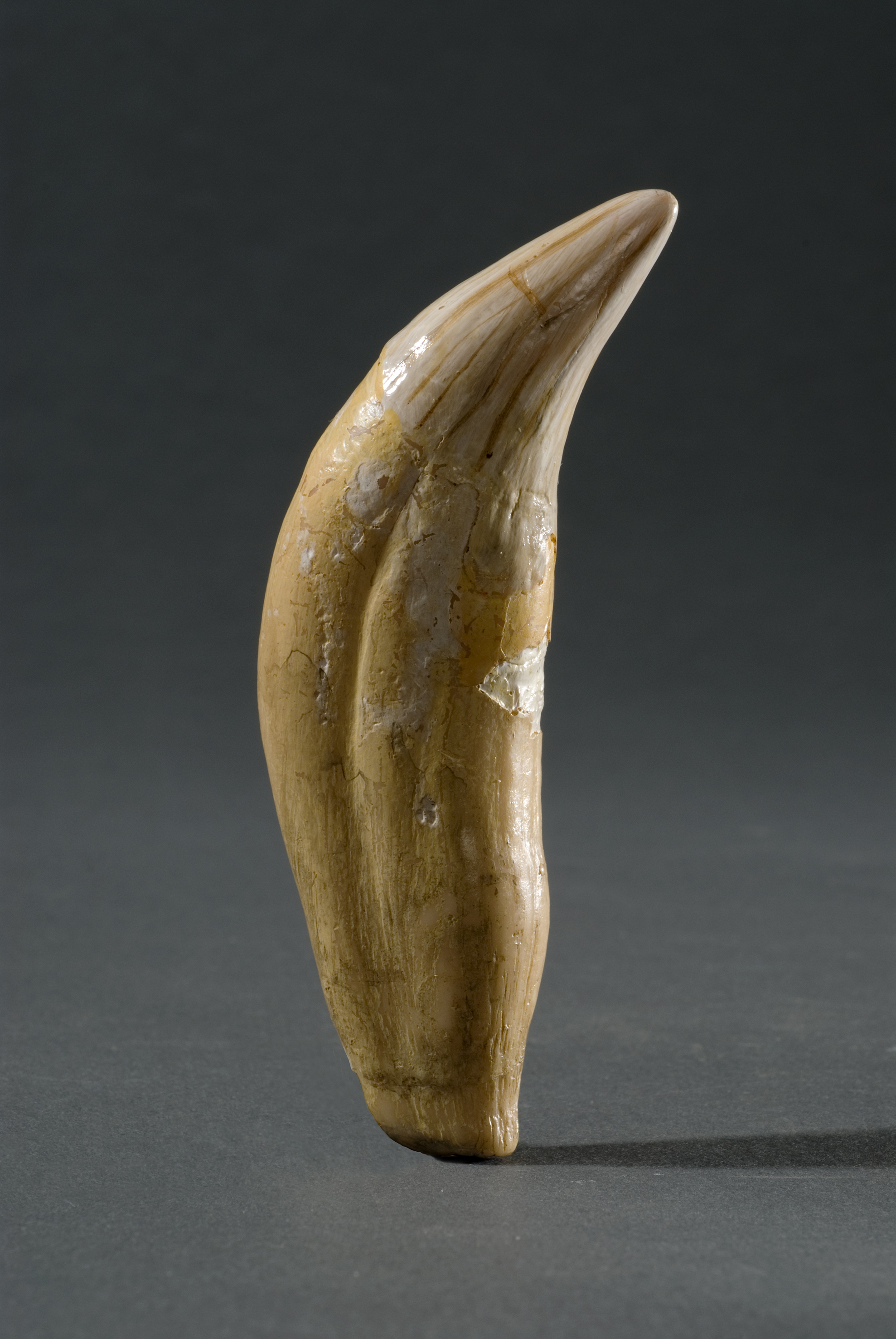 Dent d’ours des cavernes, Rochefort-Cotencher, paléolithique. Exposée au Laténium